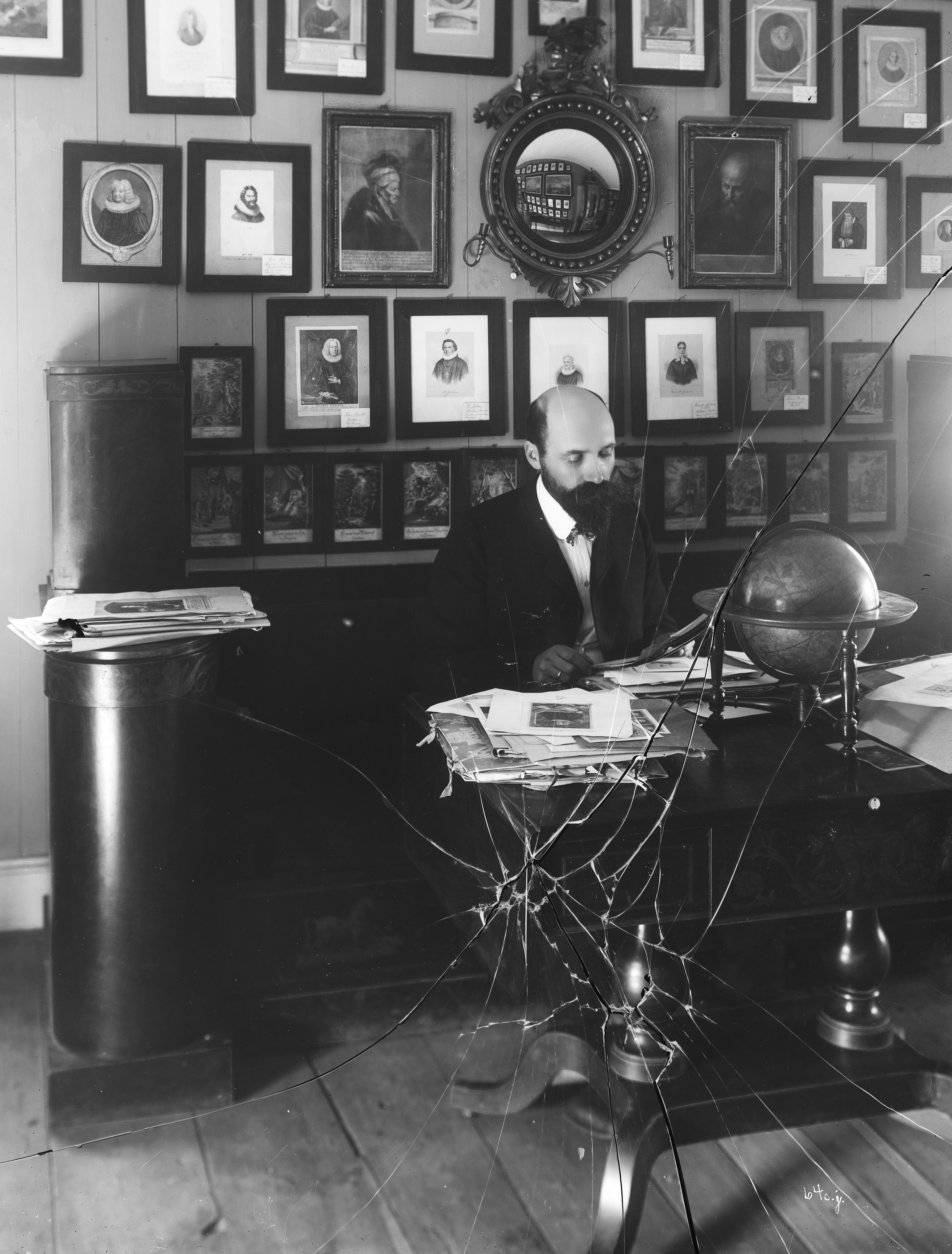 Bildet er hentet fra Nasjonalbibliotekets bildesamling. Anmerkninger til bildet var: Påskrift negativ: Sandvigske Samlinger. Interiør fra kapteinstuen. 2ene etg. (Sandvig) Påskrift vedlagt ark: Sandvigske samlinger. interiør fra Kapteinstuen I (Sandvig) Oslo, Oslo Depicted person: Sandvig, Anders